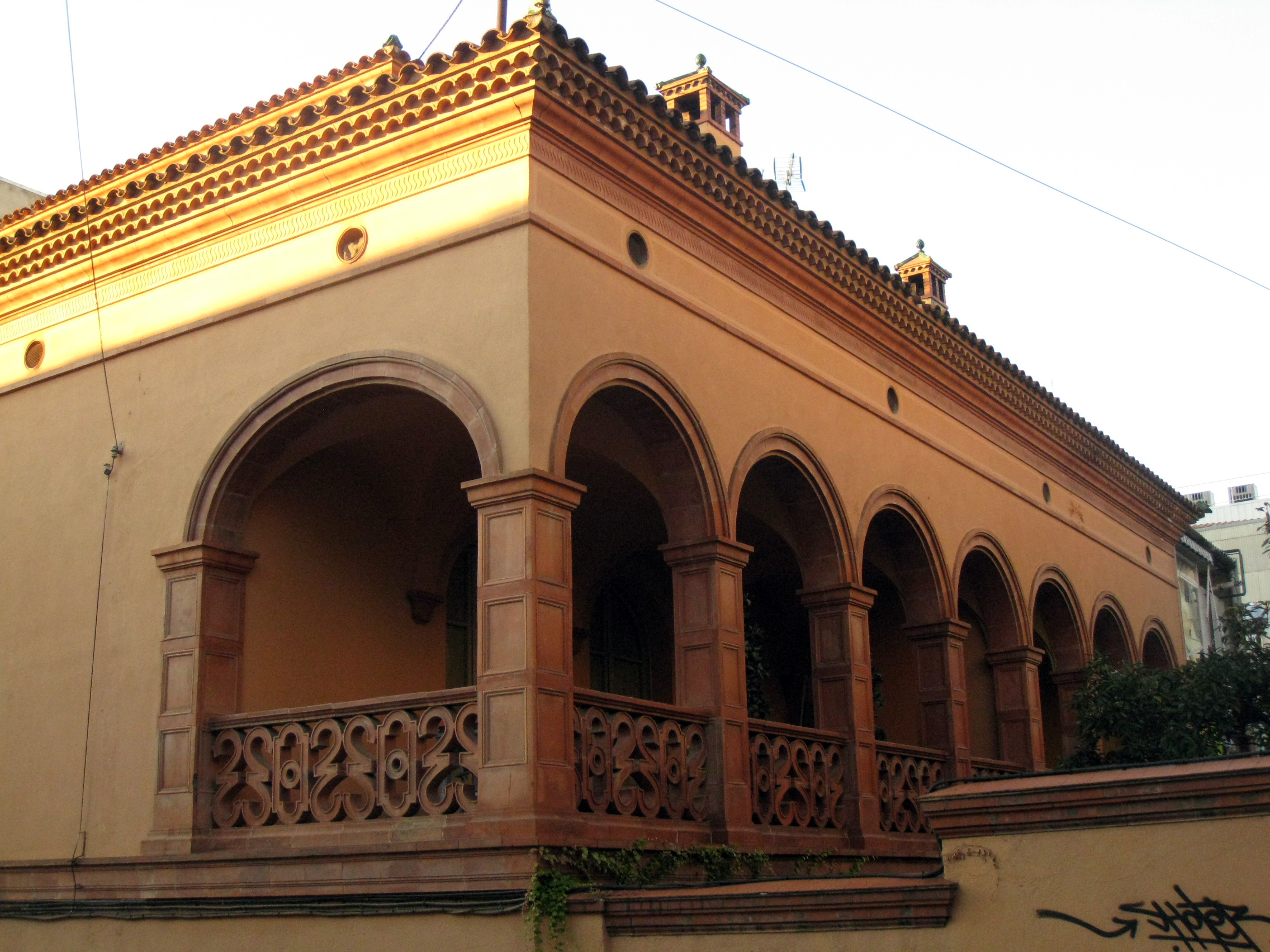 Casa Pere Segués i Donadeu, al carrer de Vinyals núm. 35, cantonada amb Doctor Cabanes (Terrassa). Edifici noucentista d'Ignasi Escudé (1942). Detall de la galeria porticada de la façana posterior, vista des del carrer del Doctor Cabanes.